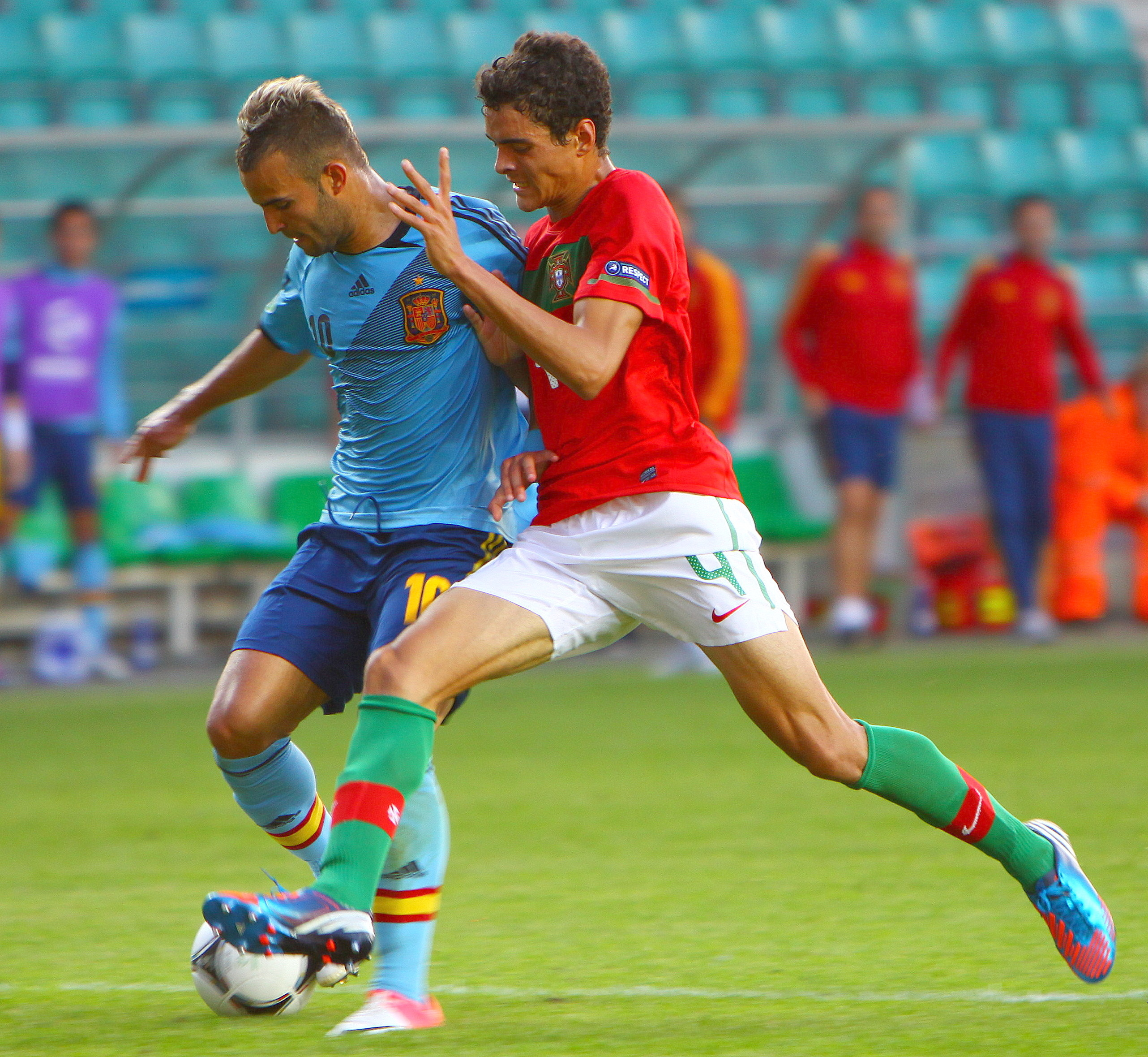 U-19 Portugal vs Spain.